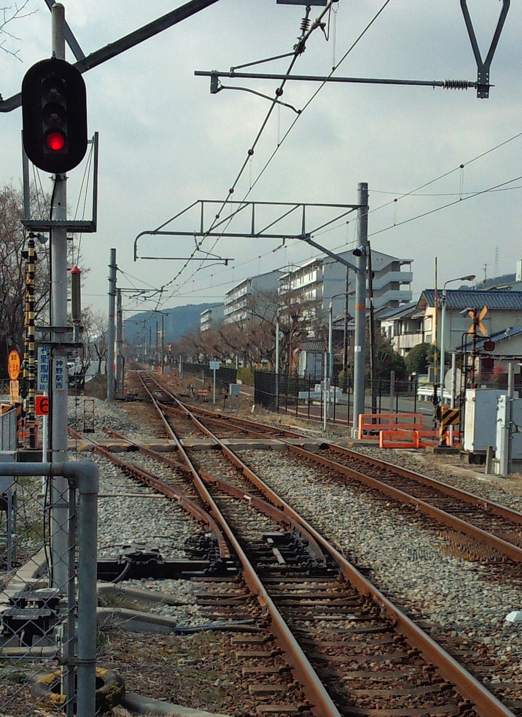 JR神野駅安全側線